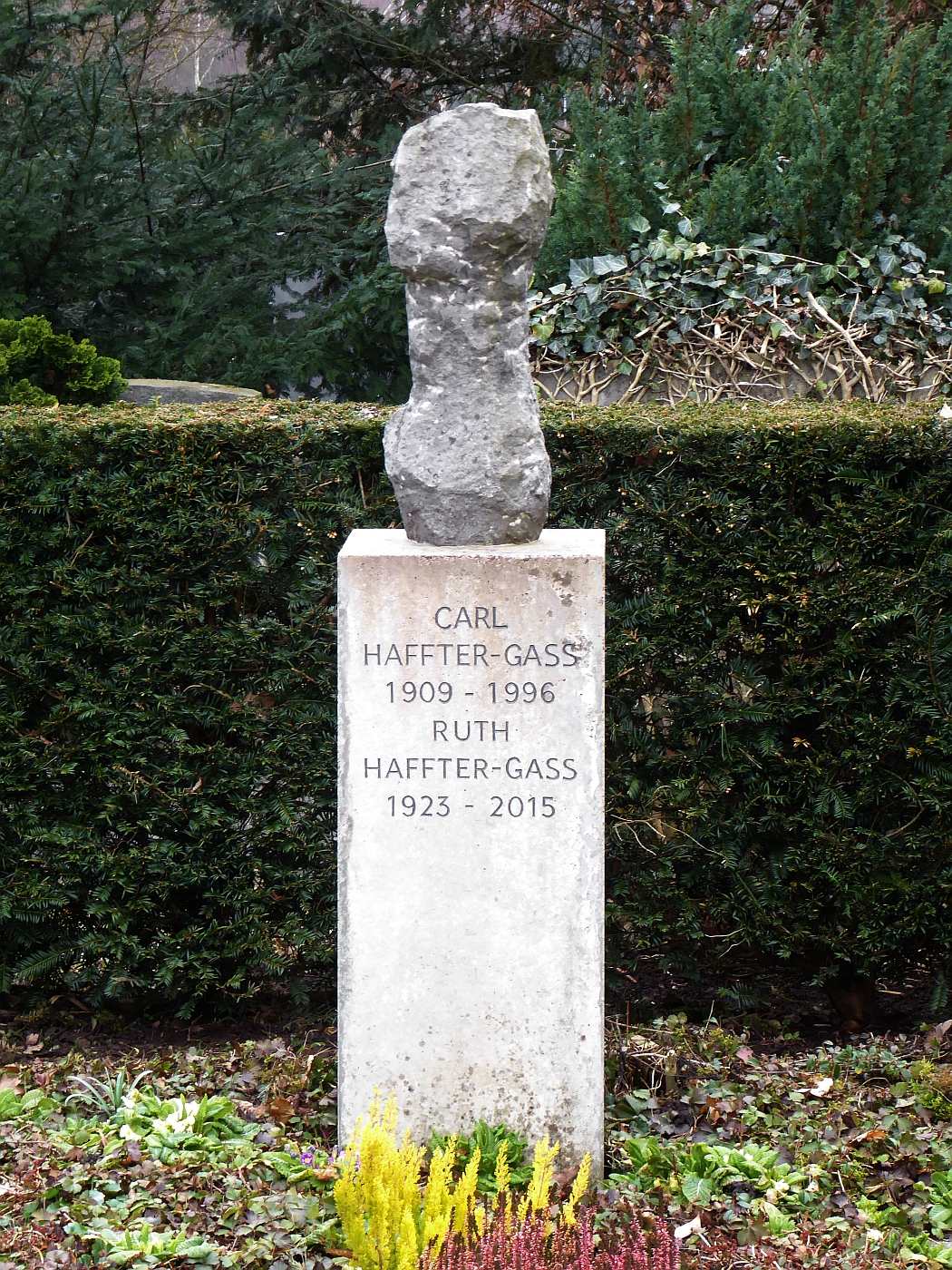 Carl Haffter-Gass (1909–1996) Kinder- und Jugendpsychiater, Ruth Haffter-Gass (1923–2015) Grab auf dem Friedhof Hörnli, Riehen, Basel-Stadt